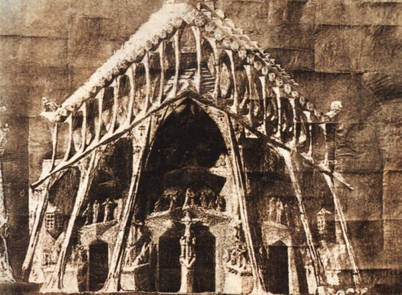 Boceto de la Fachada de la Pasión de la Sagrada Familia, de Antoni Gaudí (1911)